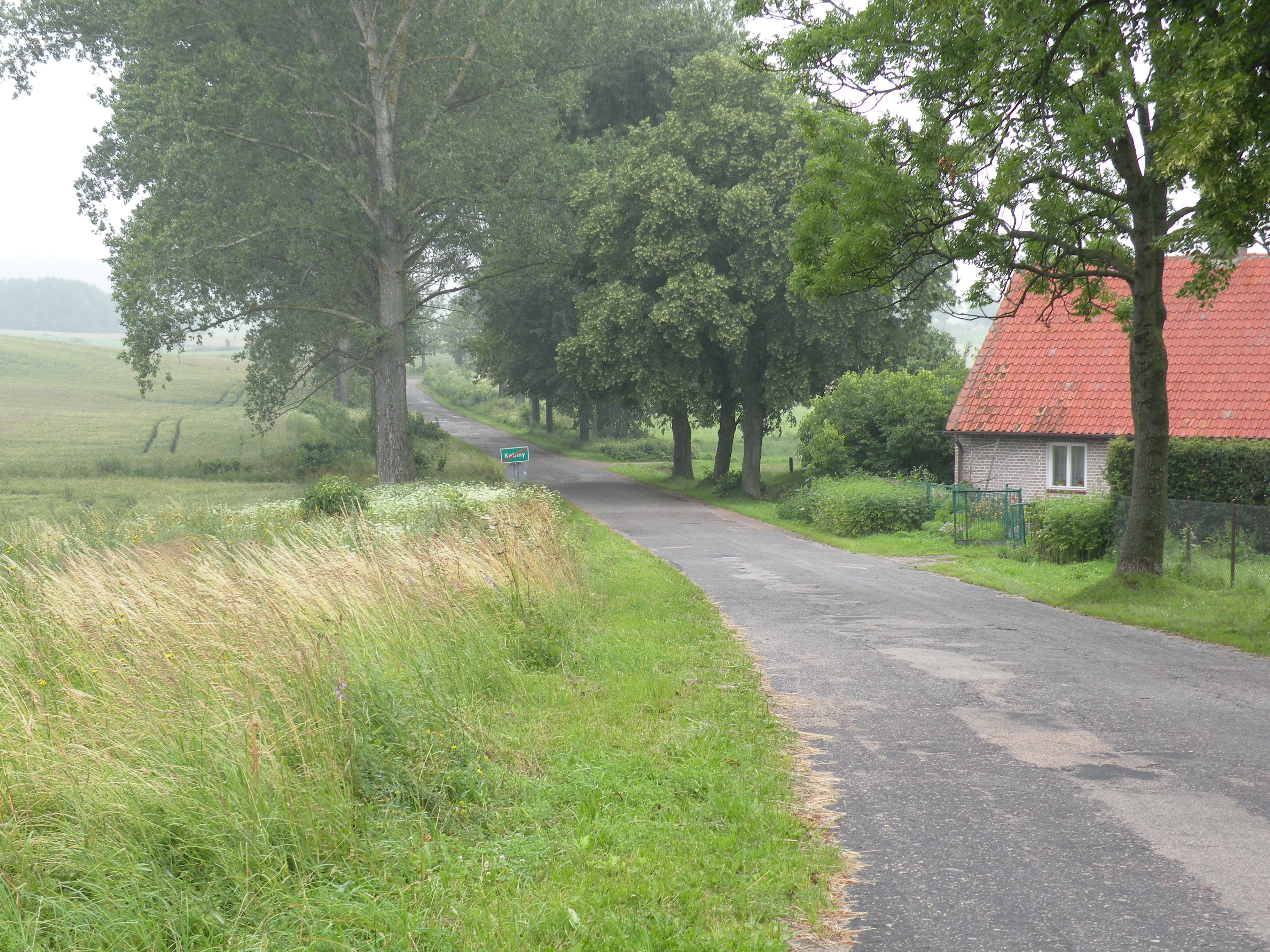 Kabiny